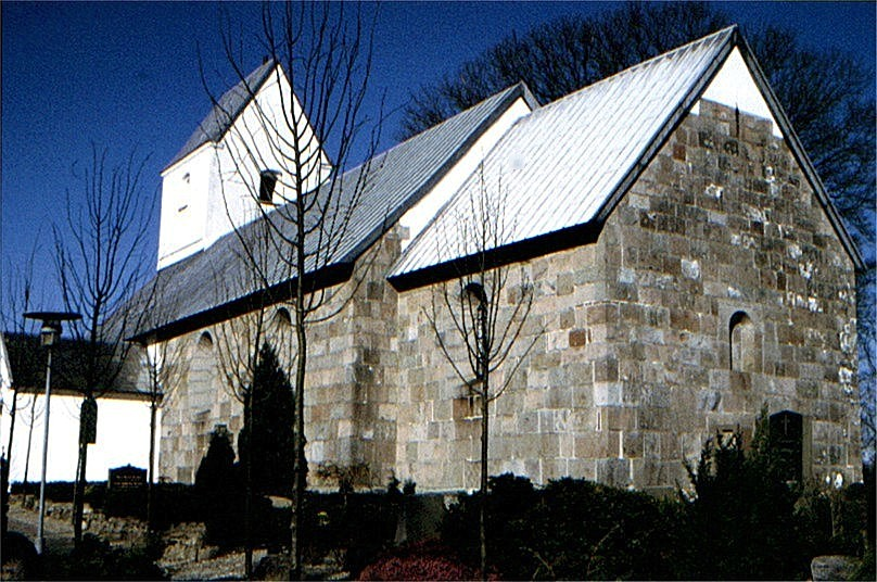 Spentrup Kirke i Danmark. Spentrup kirke